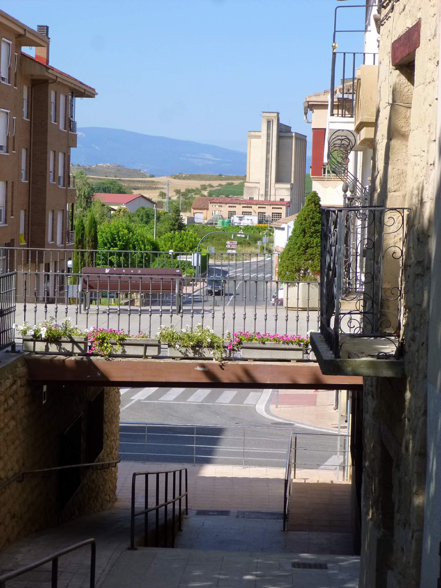 Oyón (Álava)